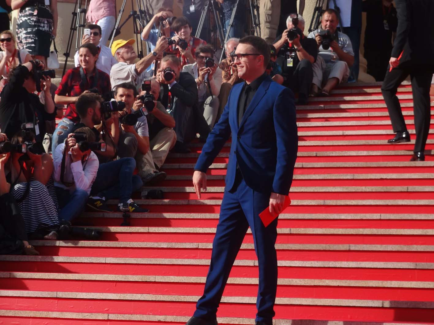 Владимир Вдовиче́нков — российский актёр театра и кино. Заслуженный артист Российской Федерации (2012). На церемонии закрытия открытого российского кинофестиваля «Кинотавр» в Сочи.